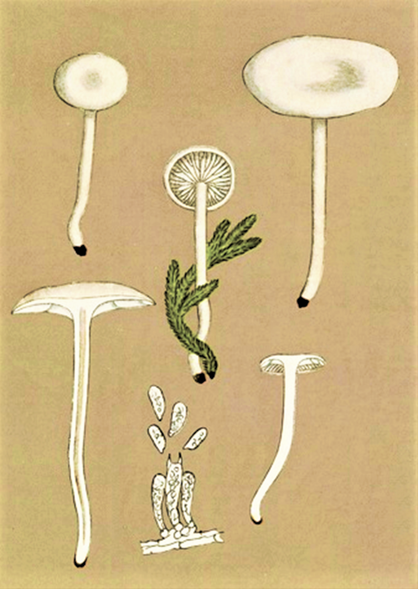 Giacomo Bresadola: Clitocybe fragrans (With., 1792) P.Kumm. (1871)